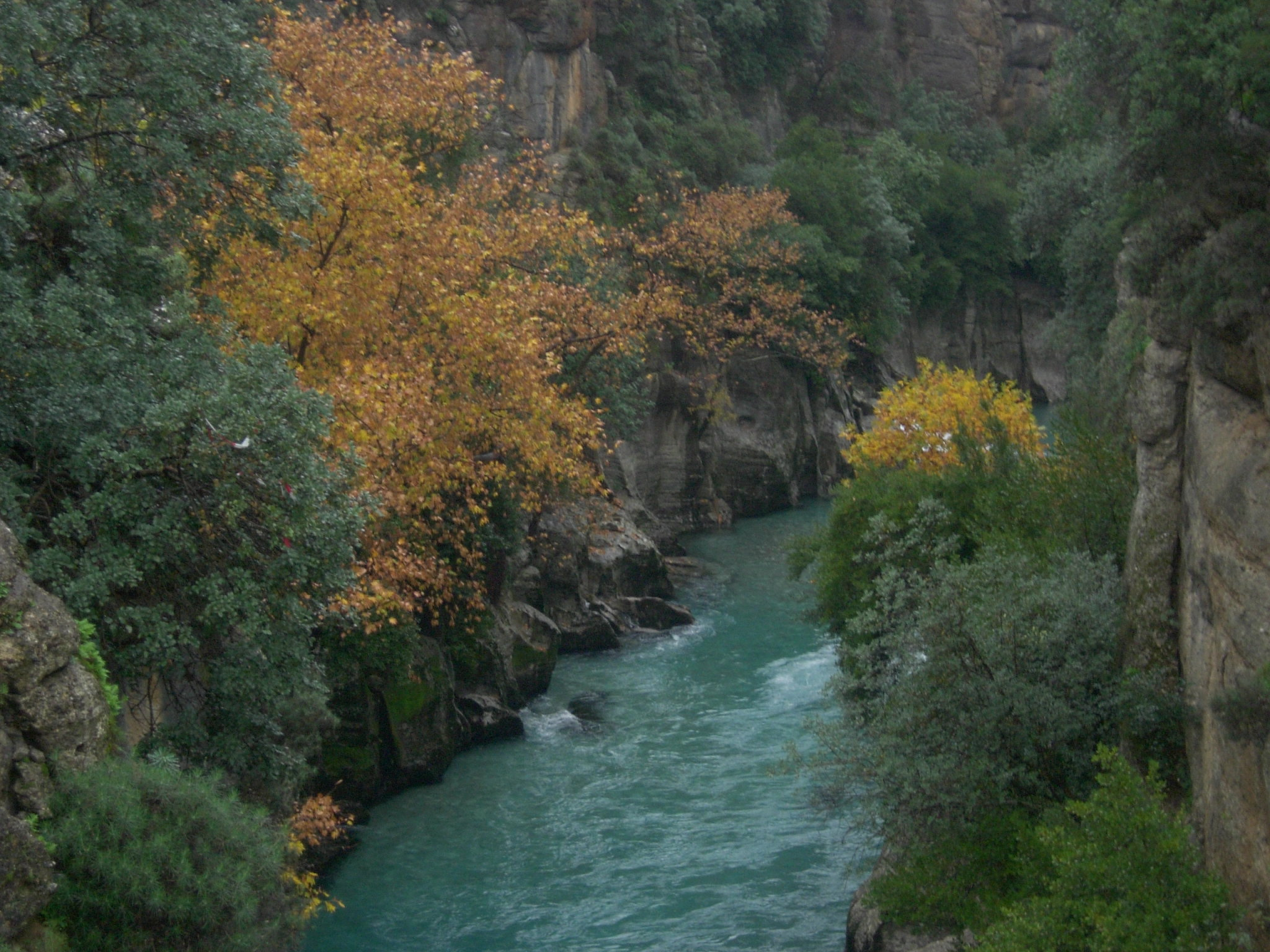 Köprülü Kanyon'dan bir görüntü. Fotoğraf Gökhan Nergiz tarafından çekilmiştir.Sütçüler, Isparta